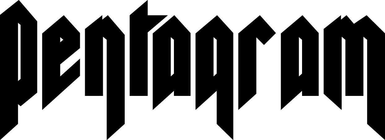 Imagen consistente en texto y vectores disponible para el dominio público.